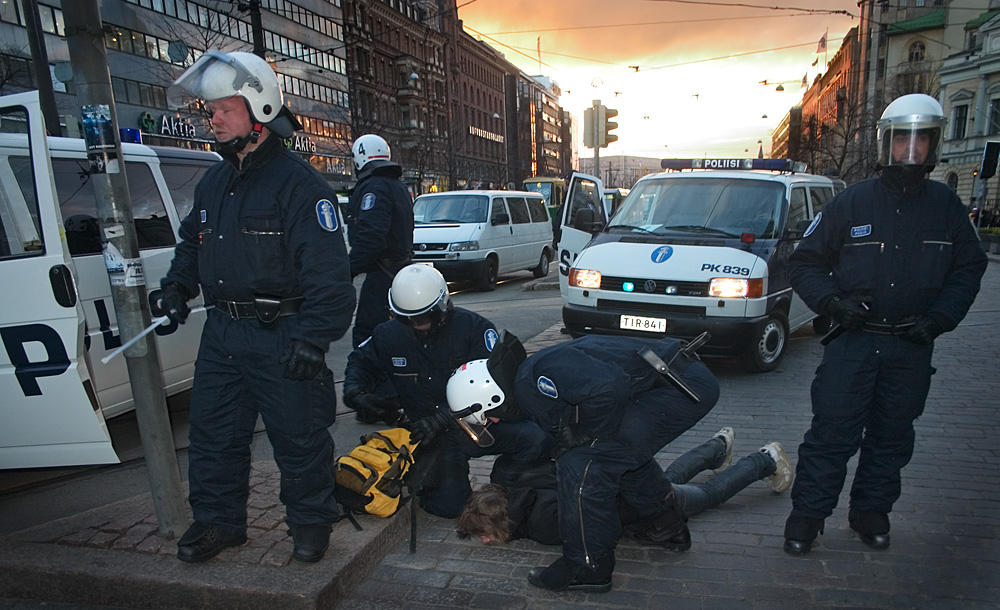 Pidätys EuroMayDay -mielenosoituksessa Helsingissä